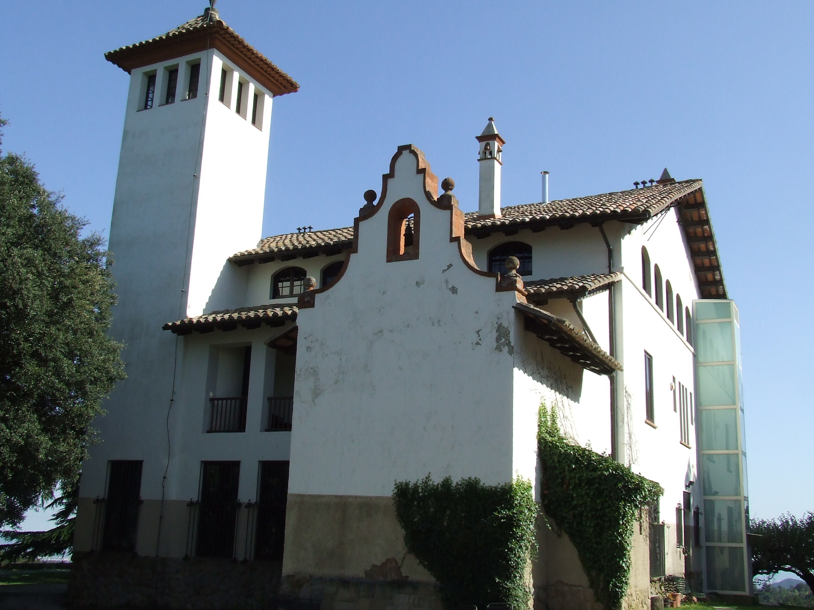 El Maset (Sant Quirze Safaja, Moianès)